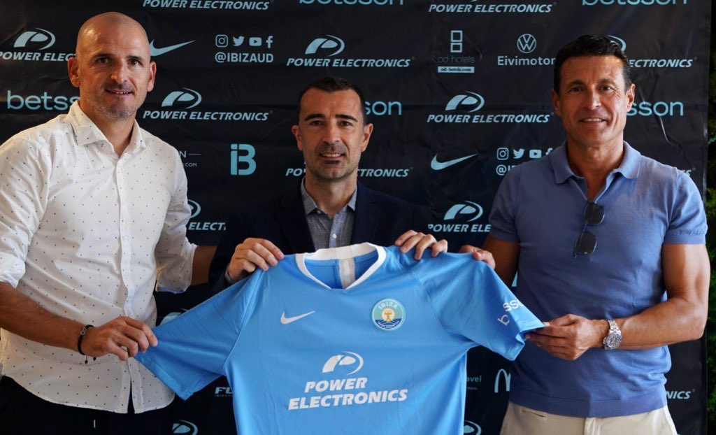 18 de agosto de 2020, Juan Carlos Carcedo es oficialmente presentado como primer entrenador de la UD Ibiza junto al Presidente y el Director deportivo de la entidad.